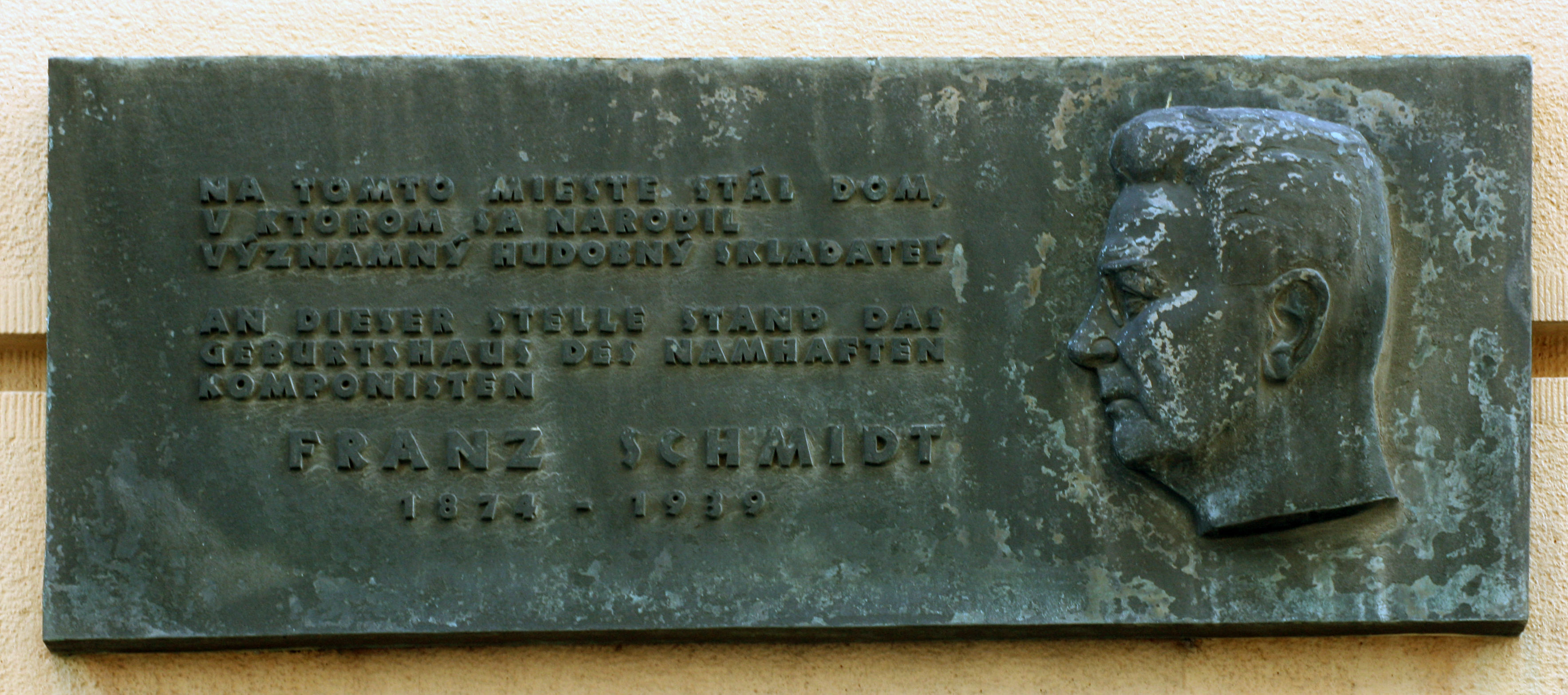 Informačná tabuľa o hudobnom skladateľovi, dirigentovi, hudobnom pedagógovi F. Schmidtovi na Uršulínskej ul. v Bratislave